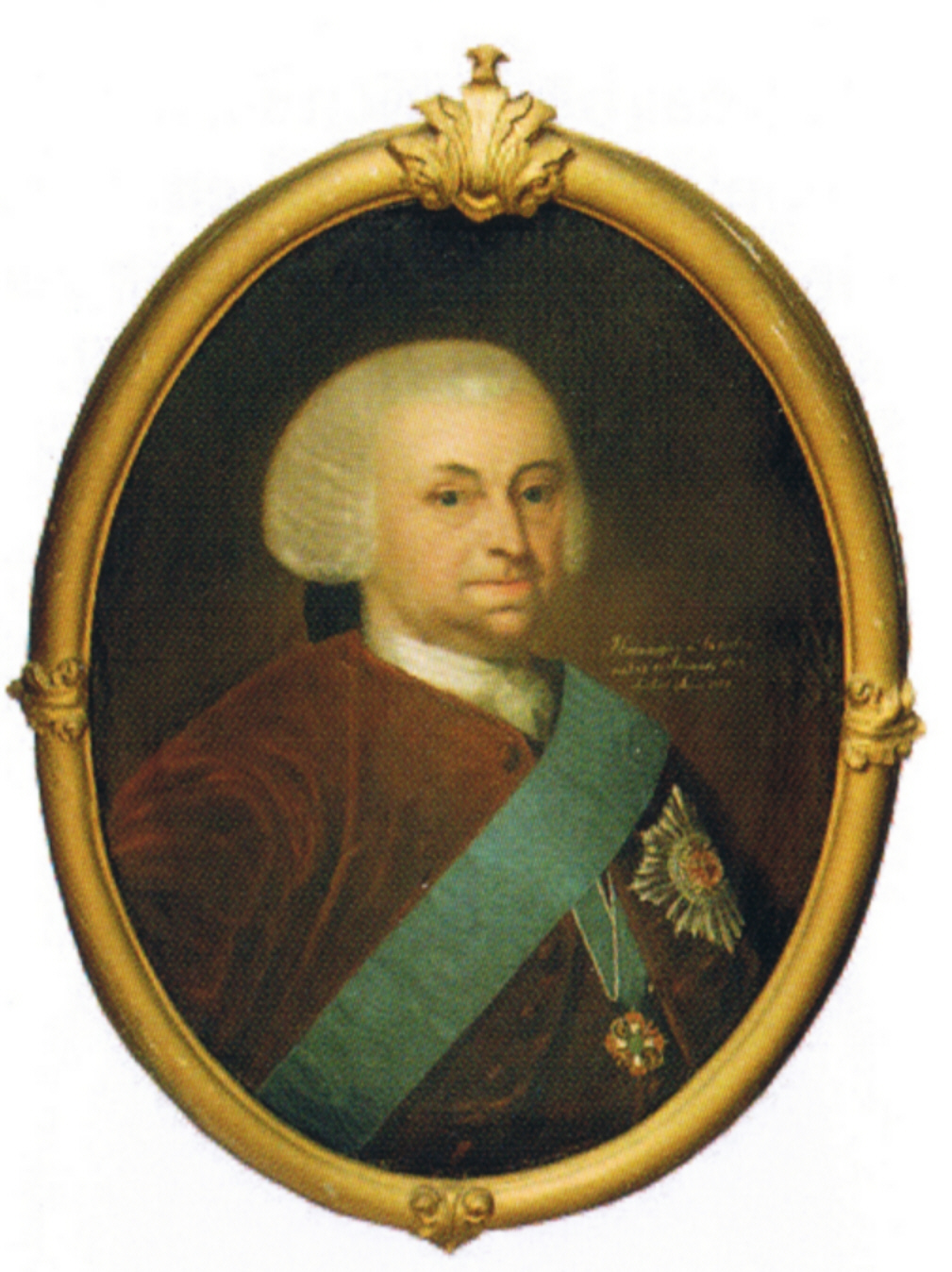 Henning von Qualen, Königlich Dänischer Geheimer- und Conferenz und Landrat und Klosterprobst von Uetersen und Oberpräsidenten zu Altona. Träger des Elefantenorden.